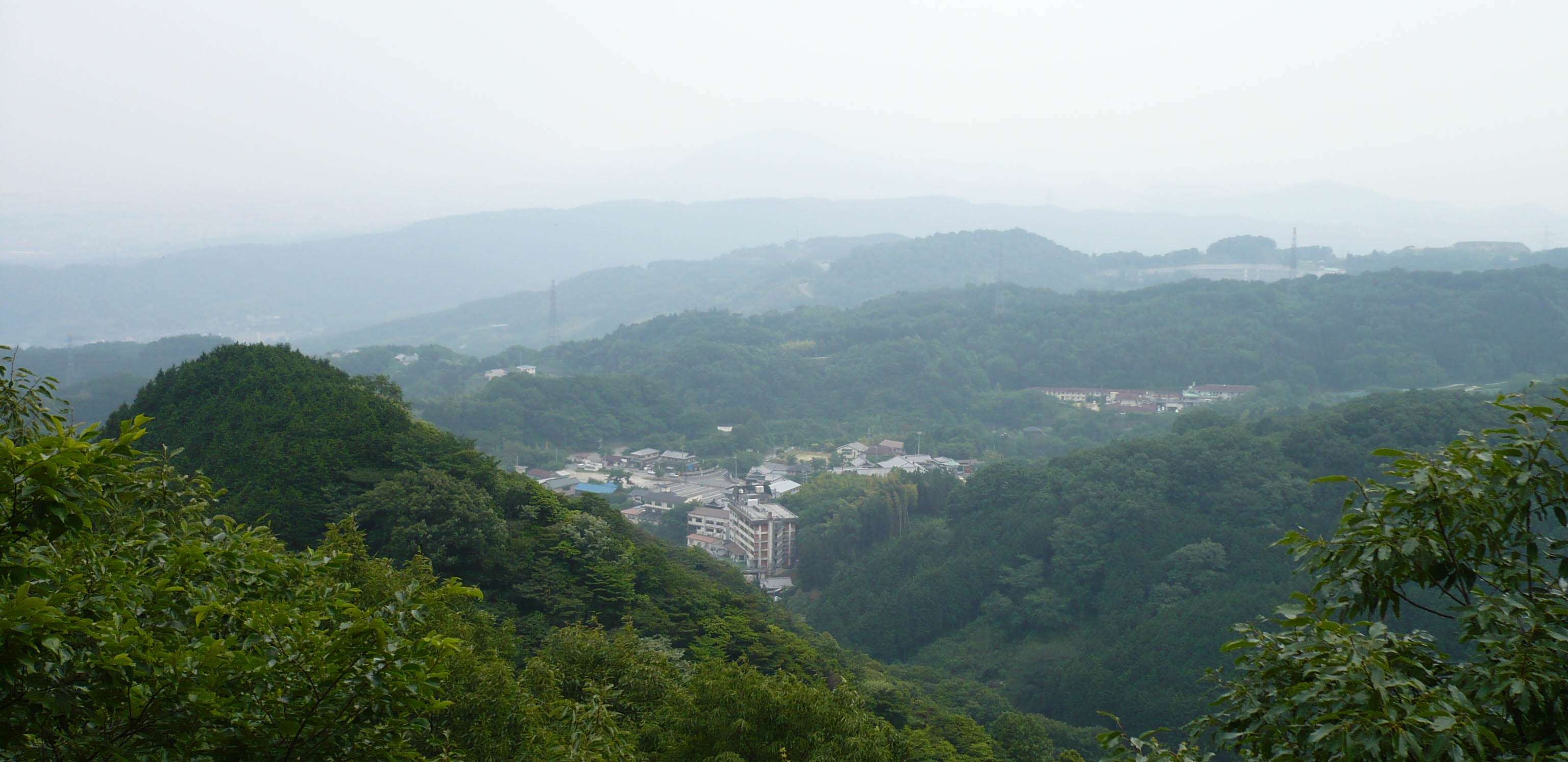 本丸跡からの眺望